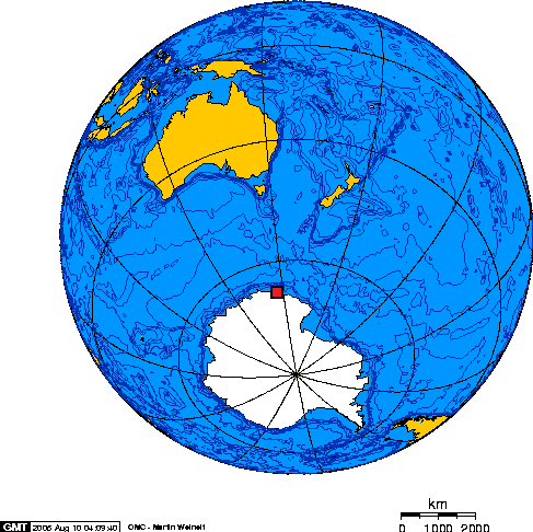 Die Karte zeigt den Standort des Mertz-Gletschers auf der Antarktis